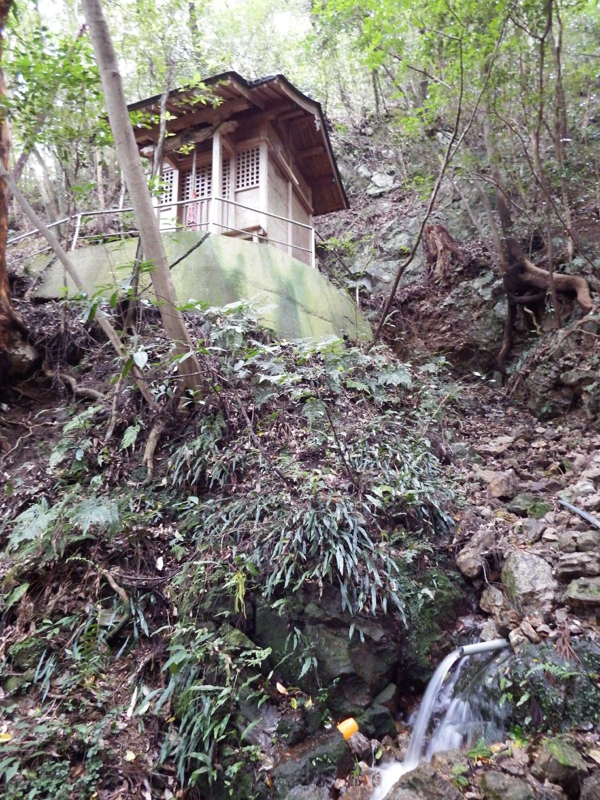 清滝寺の奥之院